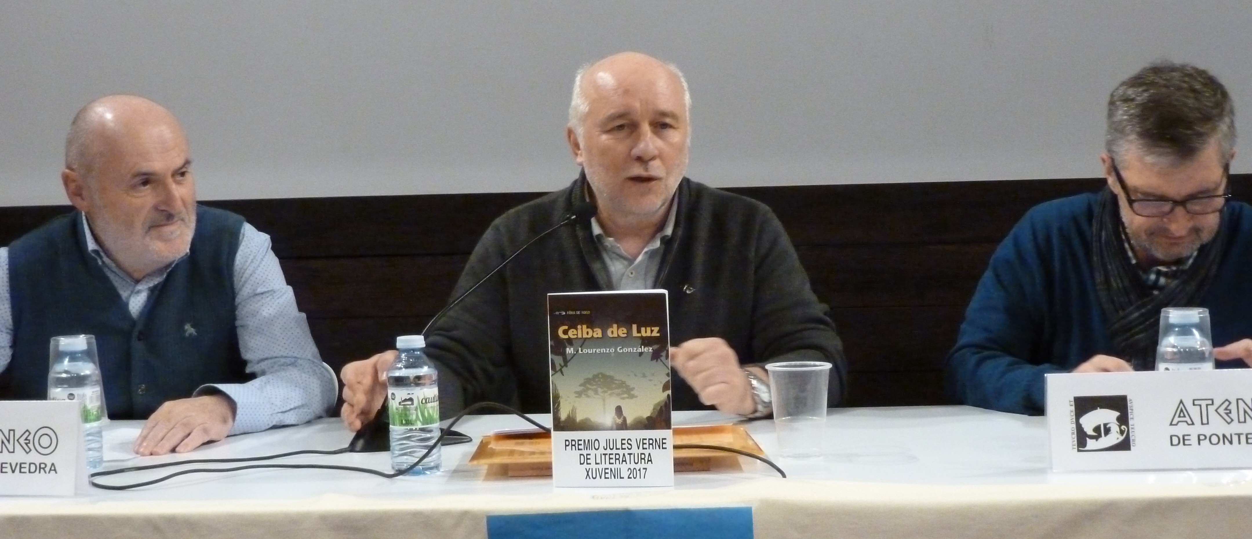 Anxo González Guerra, Manuel Lourenzo González e Manuel Bragado